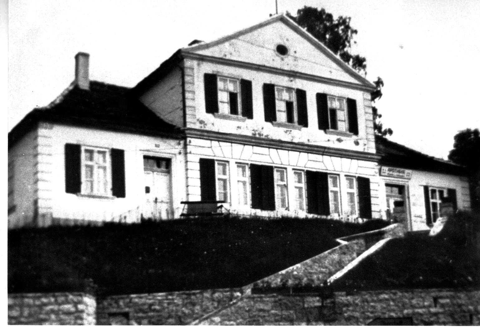 Foto der ersten Burgkunstadter Apotheke auf dem Wolfsberg, unterhalb der Grundschule an der Kulmbacher straße, gegründet von Constantin Voigt